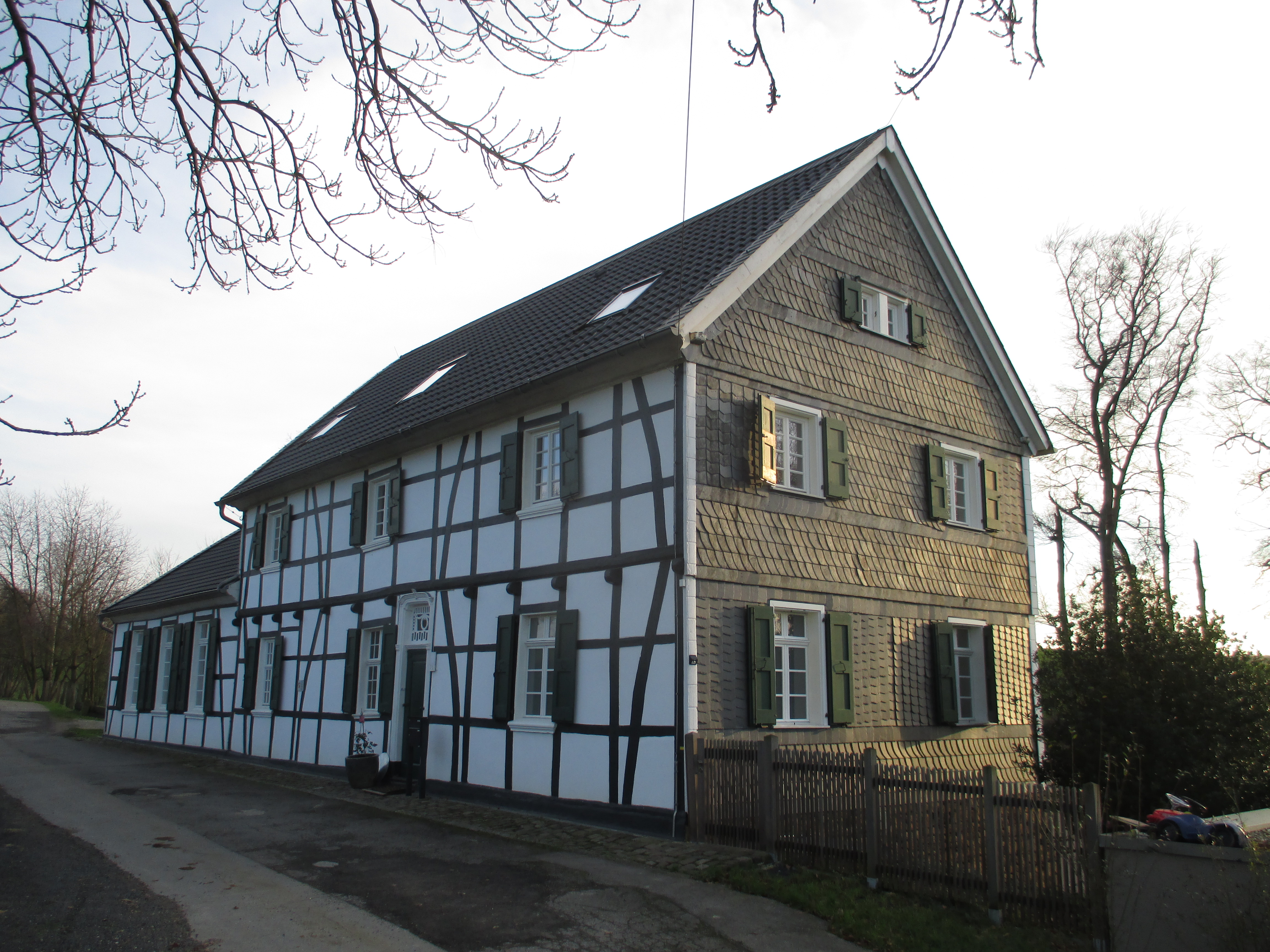 Ehemalige Icktener Schule, erbaut 1797. 1843-1936 Icktener Schule 1843 Gemeinde- und Schulbibliothek 1859-1934 Literarischer Verein. Gründer: G. Klingenburg 1939-1941 Wohnung und Atelier Hermann Lickfeld Heute Wohnhaus